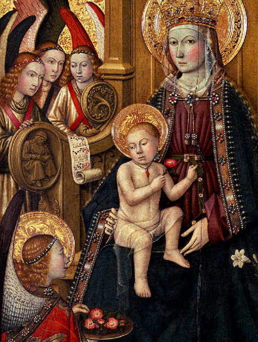 Detall de la taula central del retaule de la Mare de Déu de Vallmoll. Procedeix de l'antiga església parroquial de Vallmoll (Alt Camp).